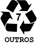 A imagem representa o código de reciclagem utilizado no Brasil para materiais do tipo "7 - outros".